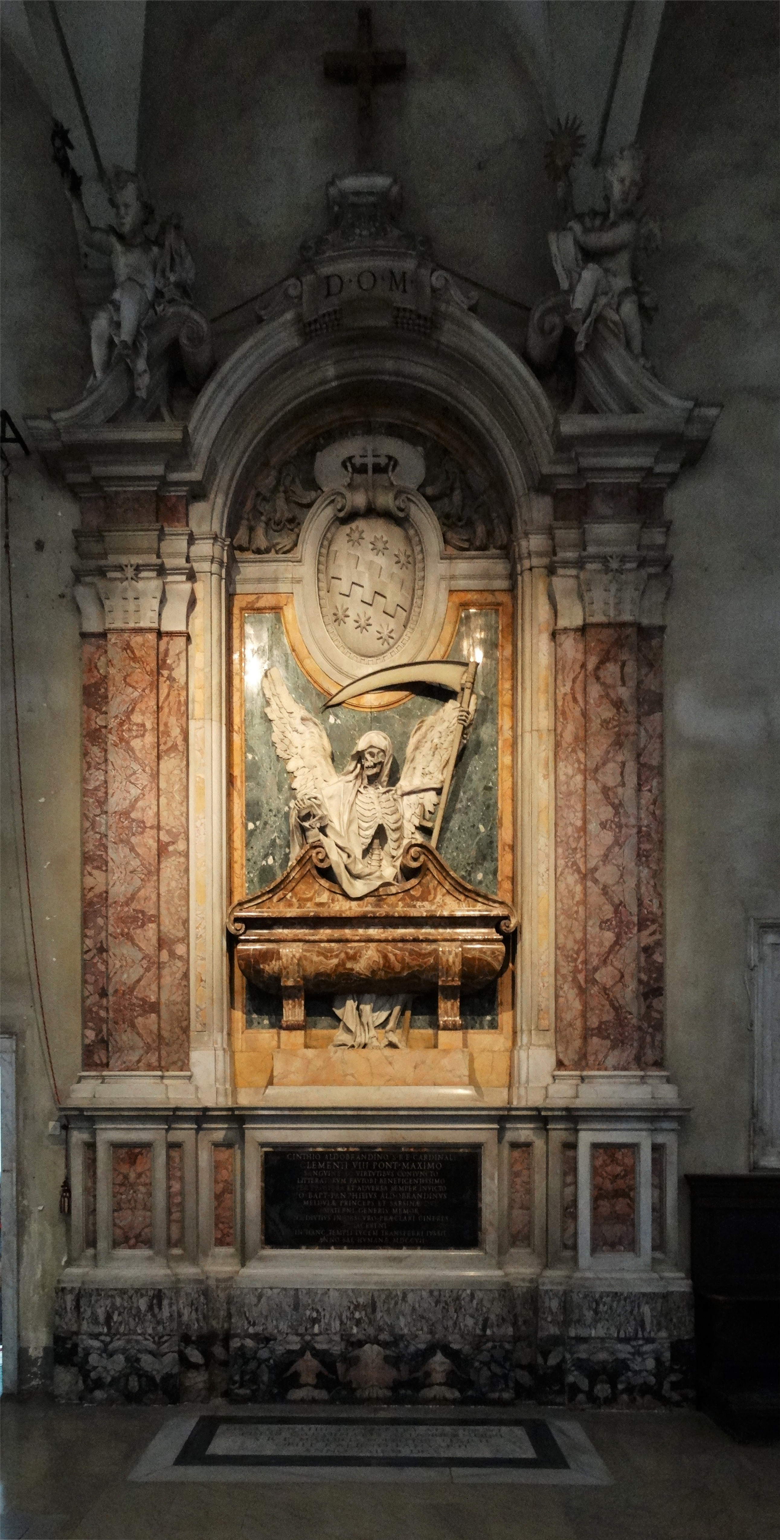 Tomba del Cardinale Cinzio Passeri Aldobrandini 1610